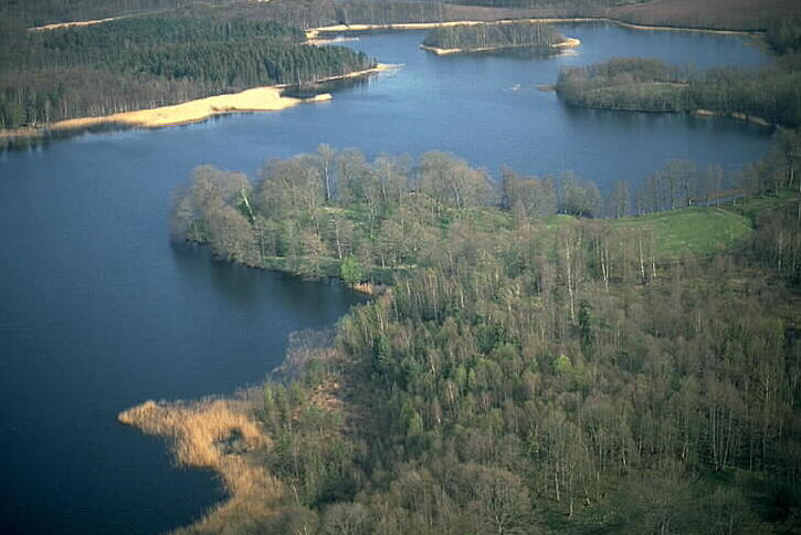 Miljö med lämningar efter Axevalla hus. Motiv: Axevalla hus Nyckelord: Flygbilder, Riksintressen Kategori: Borg, Insjömiljöer Miljö med lämningar efter Axevalla hus.